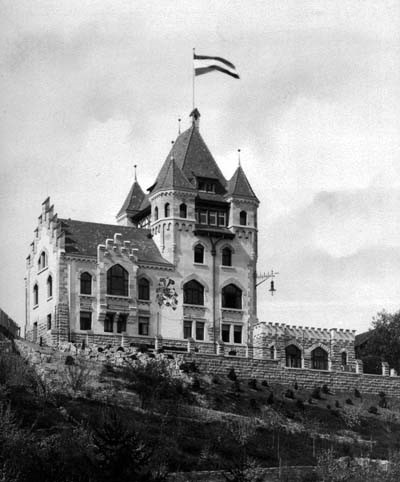 Igelhaus von Süden, kurz nach der Fertigstellung.